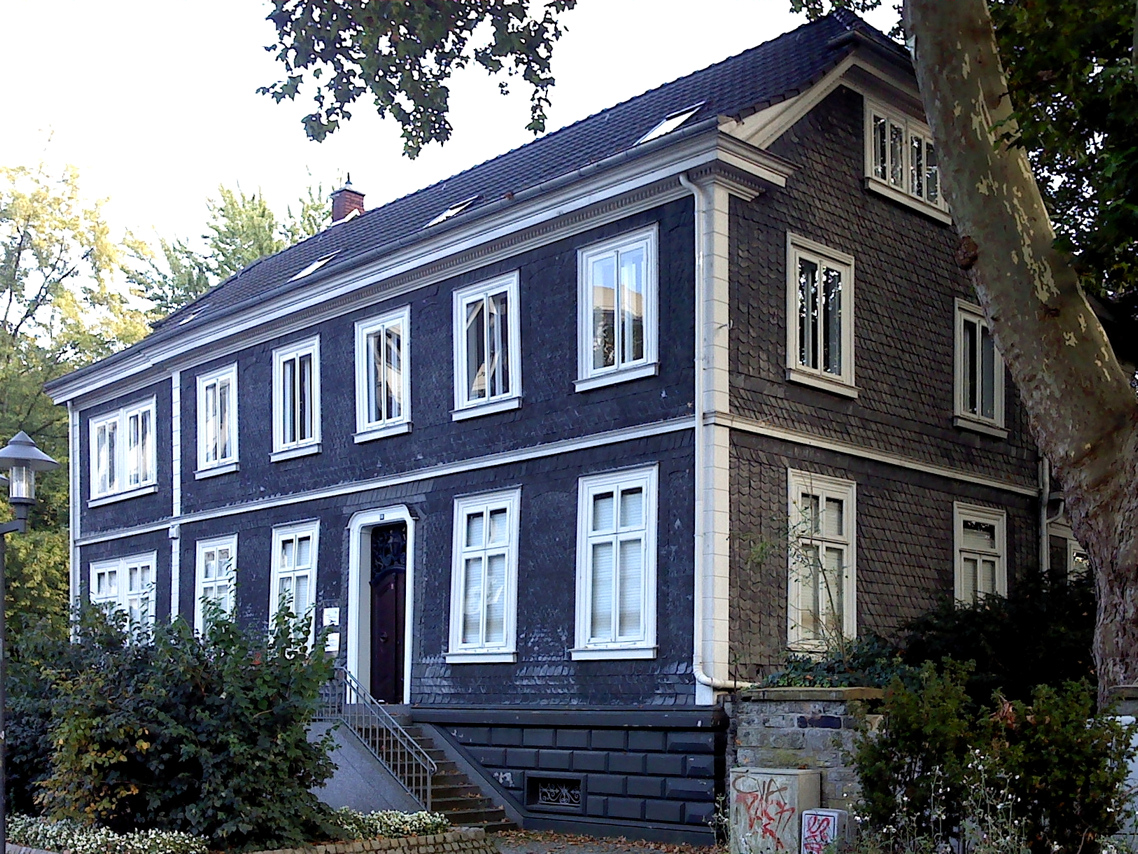 Ehem. Wohnhaus des Unternehmers Wisthoff in Essen-Steele, unter Denkmalschutz